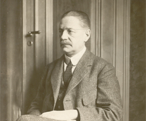 Arkitekten August Palmér (1871-1953)